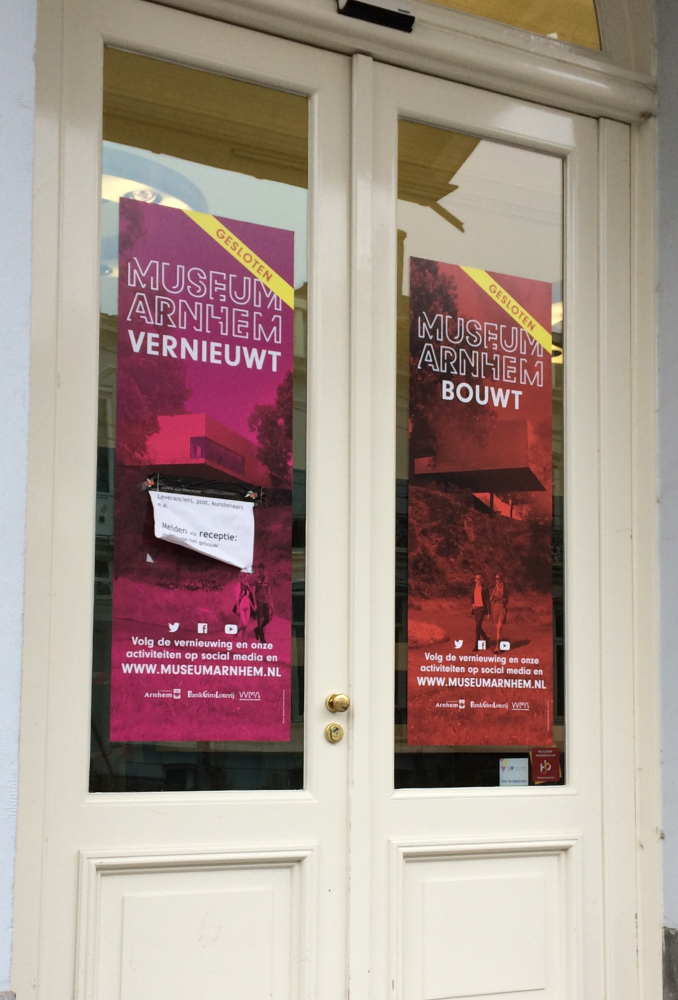 De hoofdingang met kennisgeving verbouwing.